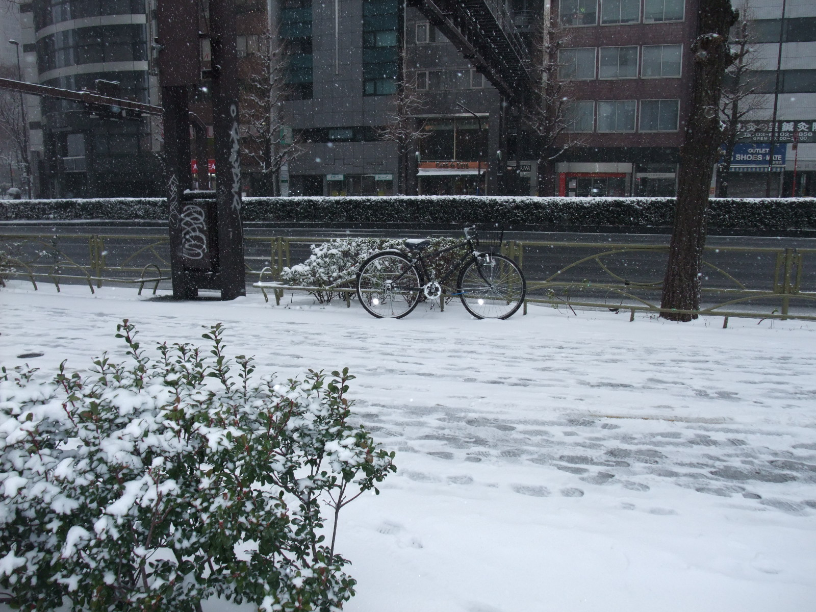 2014.2.8 新宿大雪